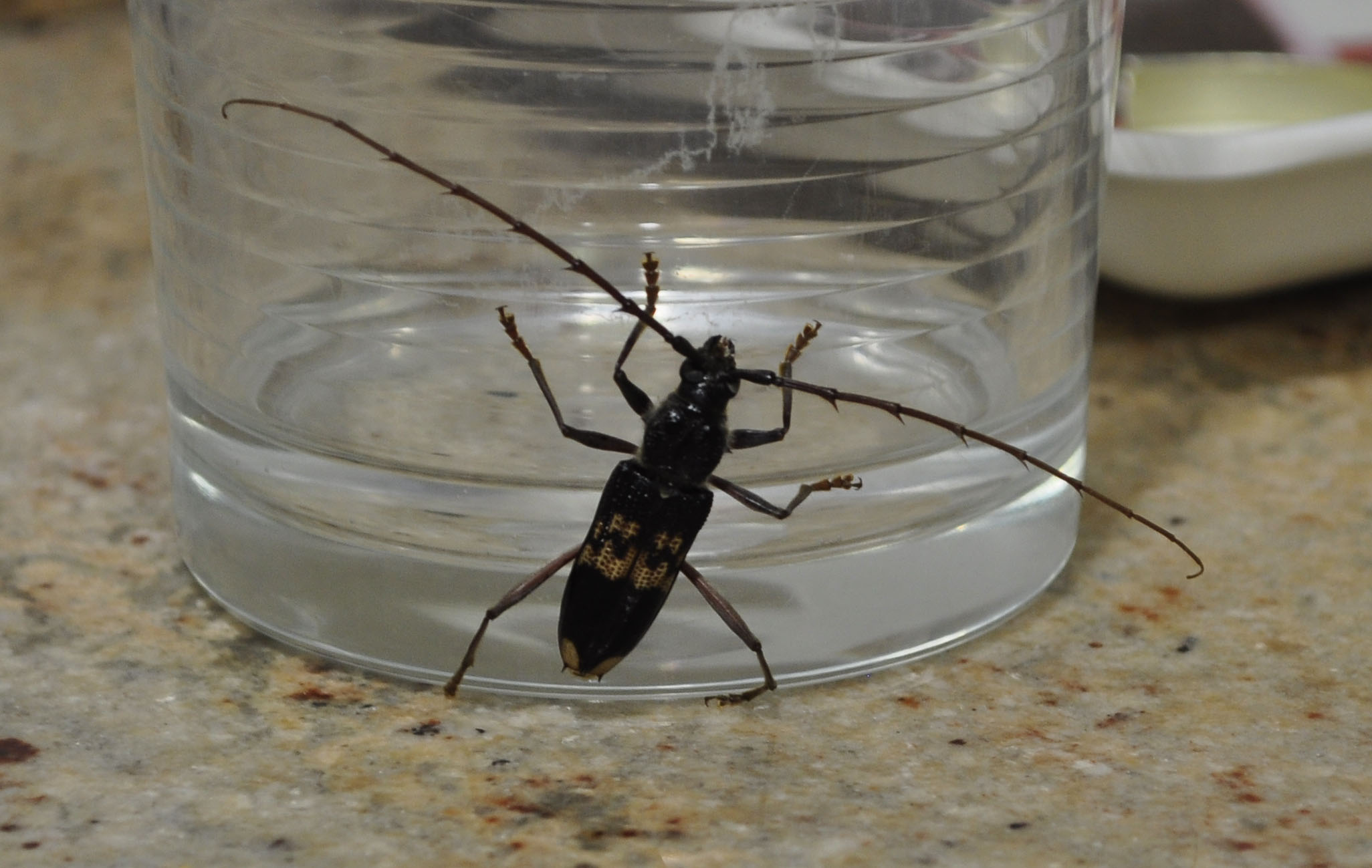 Ejemplar invasor en España de la especie 'Phoracantha semipunctata'